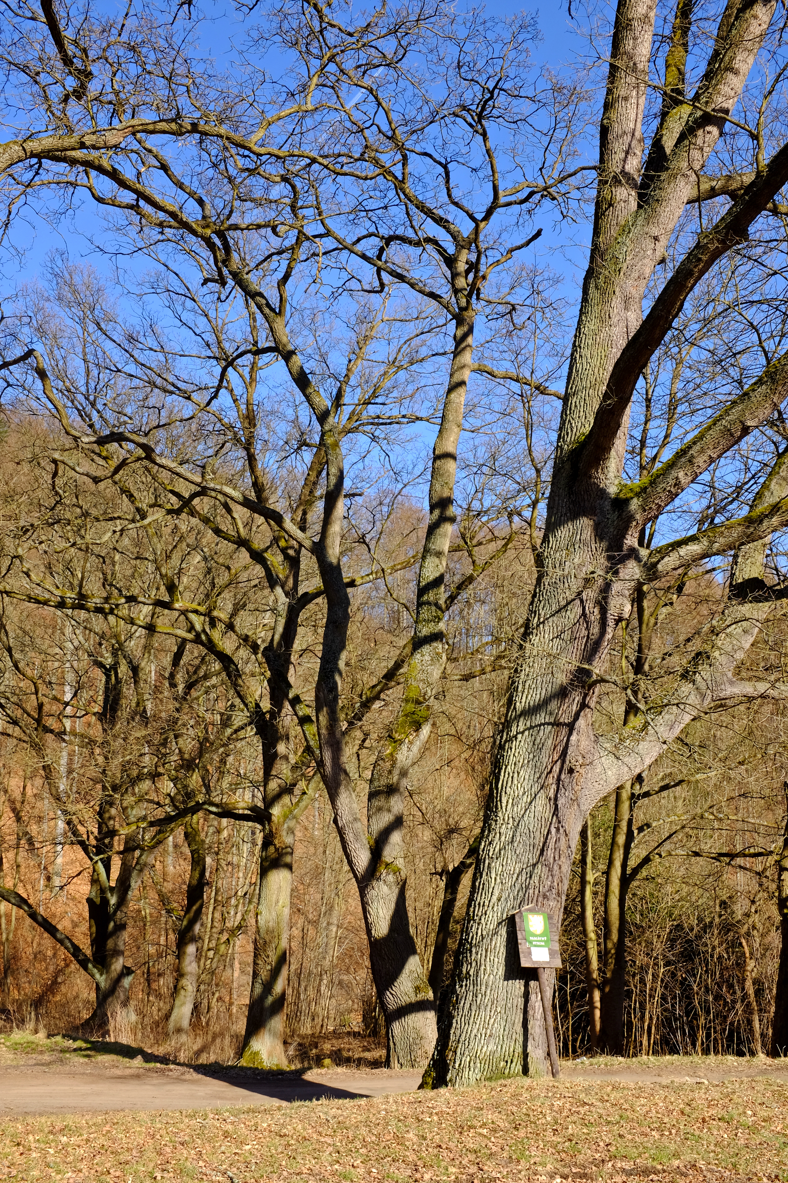 Památné stromy (stromořadí) - Duby u Panské louky - Horní Hrad, okres Karlovy Vary